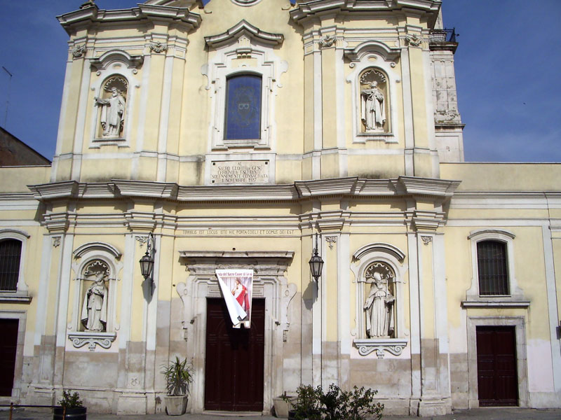 Facciata della Chiesa della Madonna del Carmine di Cerignola (FG).